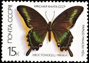 Почтовая марка СССР. Хвостоносец Маака. Номер в каталоге ЦФА 5802